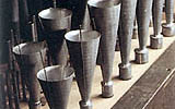 petite vignette pour bandeau représentant un jeu d'orgue de clairon